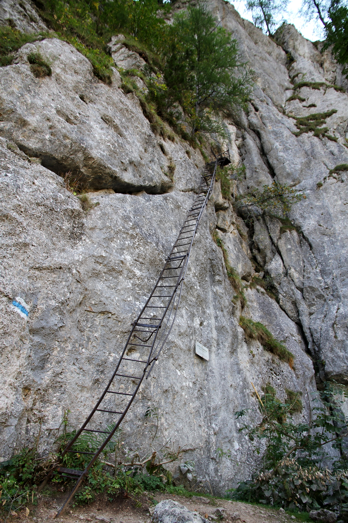 Die "luftige" Eisenleiter von August Cepl aus dem Jahr 1910 beim Einstieg des Alpenvereinsteiges im Großes Höllental.